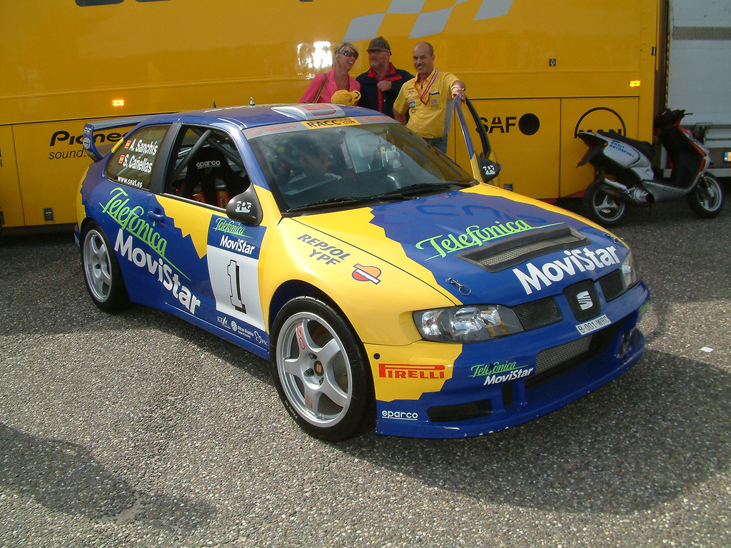 Cordoba WRC race simulator